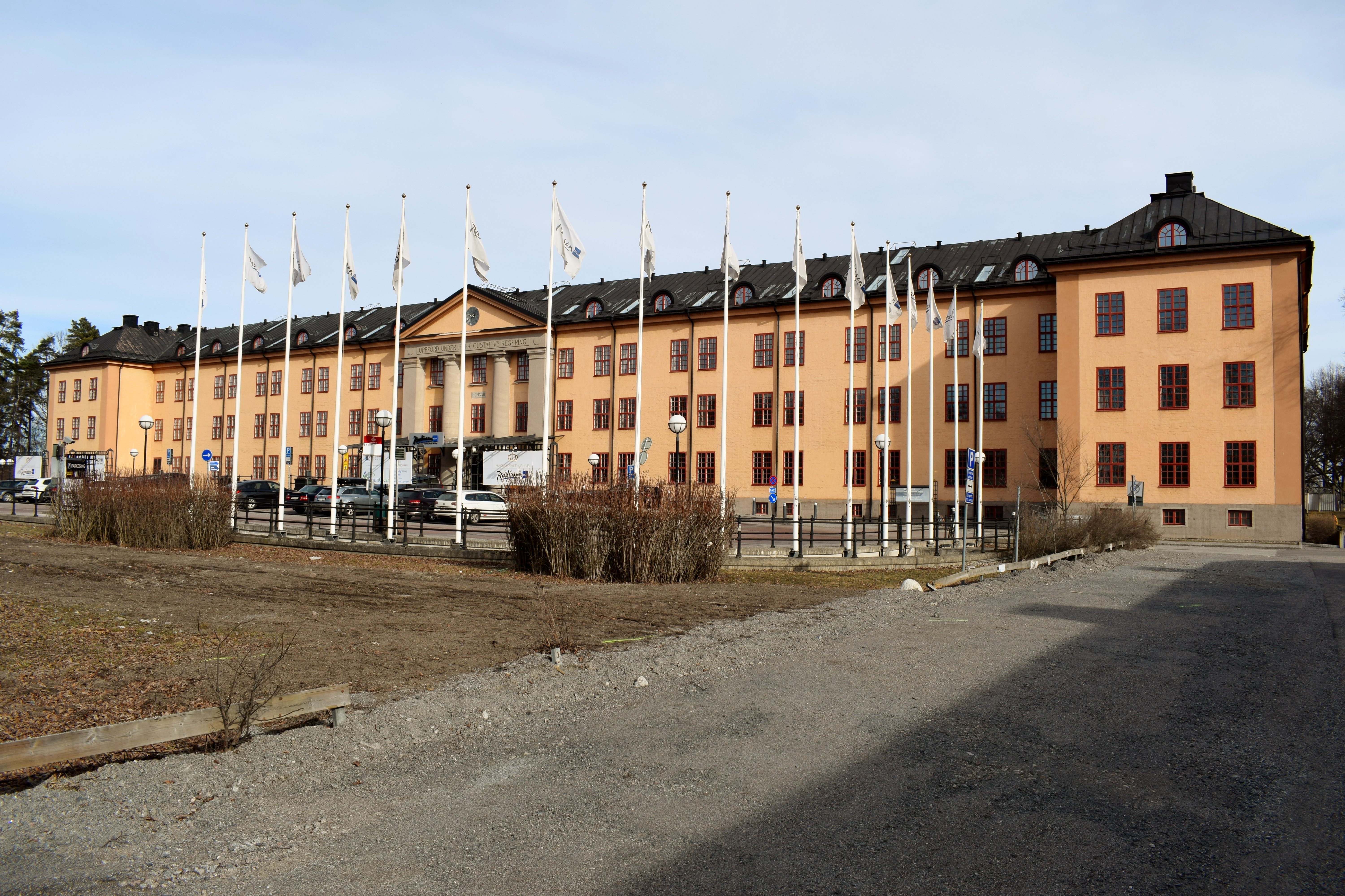 Radisson Blu Royal Park Hotel i Frösundavik, Solna. Ursprungligen uppfört för Svea ingenjörregemente. Kasernen är ritade av arkitekten Erik Josephson. Regementet var förlagt i Frösundavik åren 1922–1970.